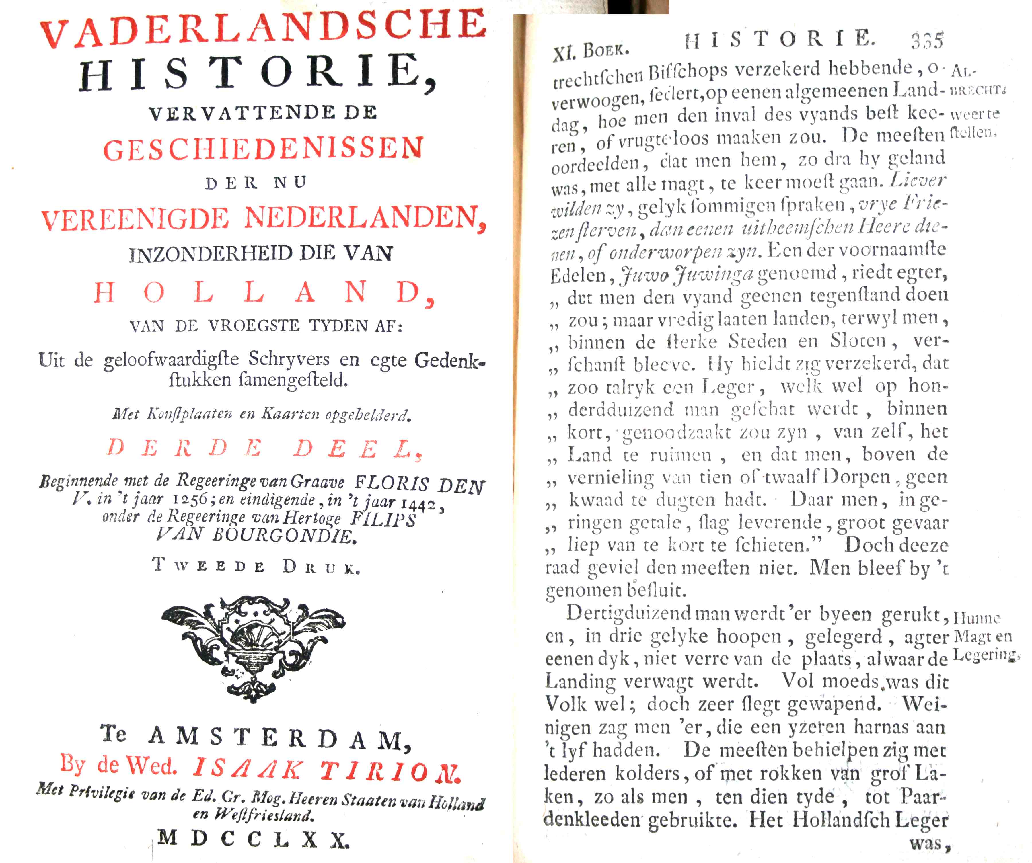 Deel 3 van 18e eeuws geschiedenisboeken serie: Vaderlandsche historie, vervattende de geschiedenissen der nu vereenigde Nederlanden, inzonderheid die van Holland, van de vroegste tyden af: uit de geloofwaardigste schryvers en egte gedenkstukken samengesteld., 21 delen, 1752-1759